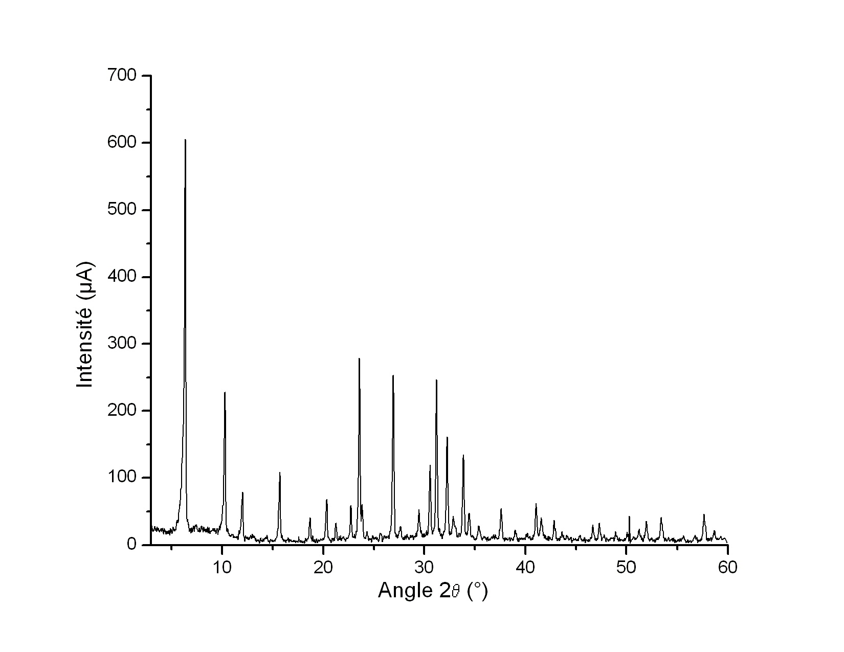 Diffractogramme d'une zéolithe de type LSX.